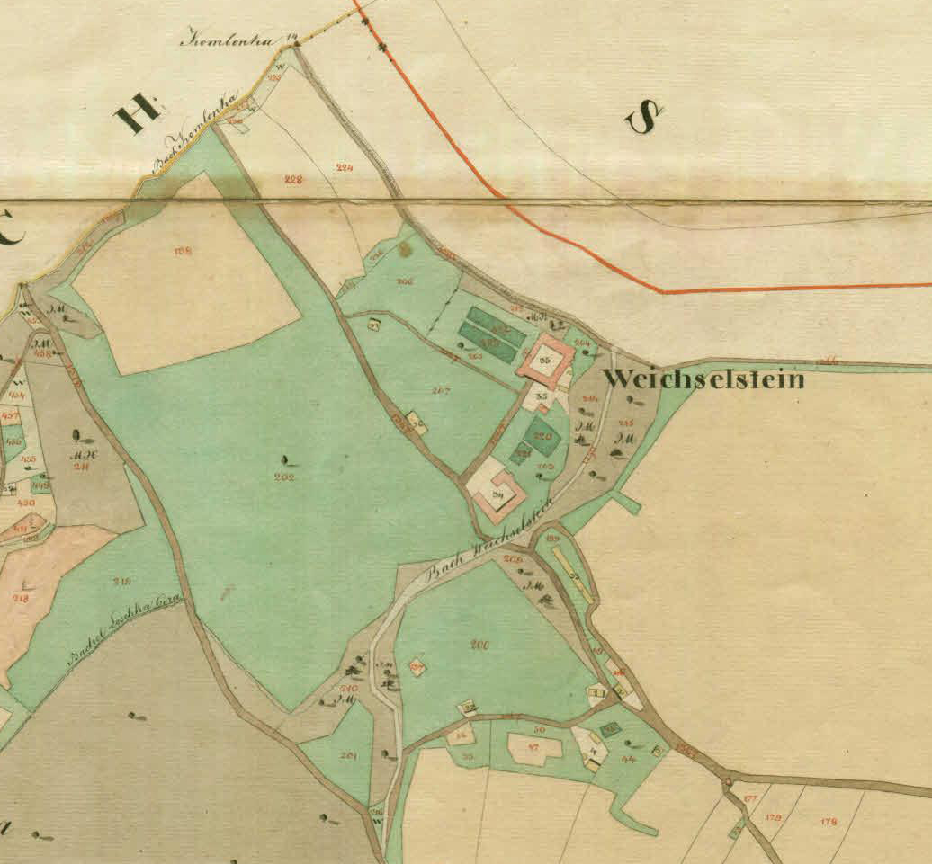 Franciscejski kataster za Kranjsko, 1823-1869